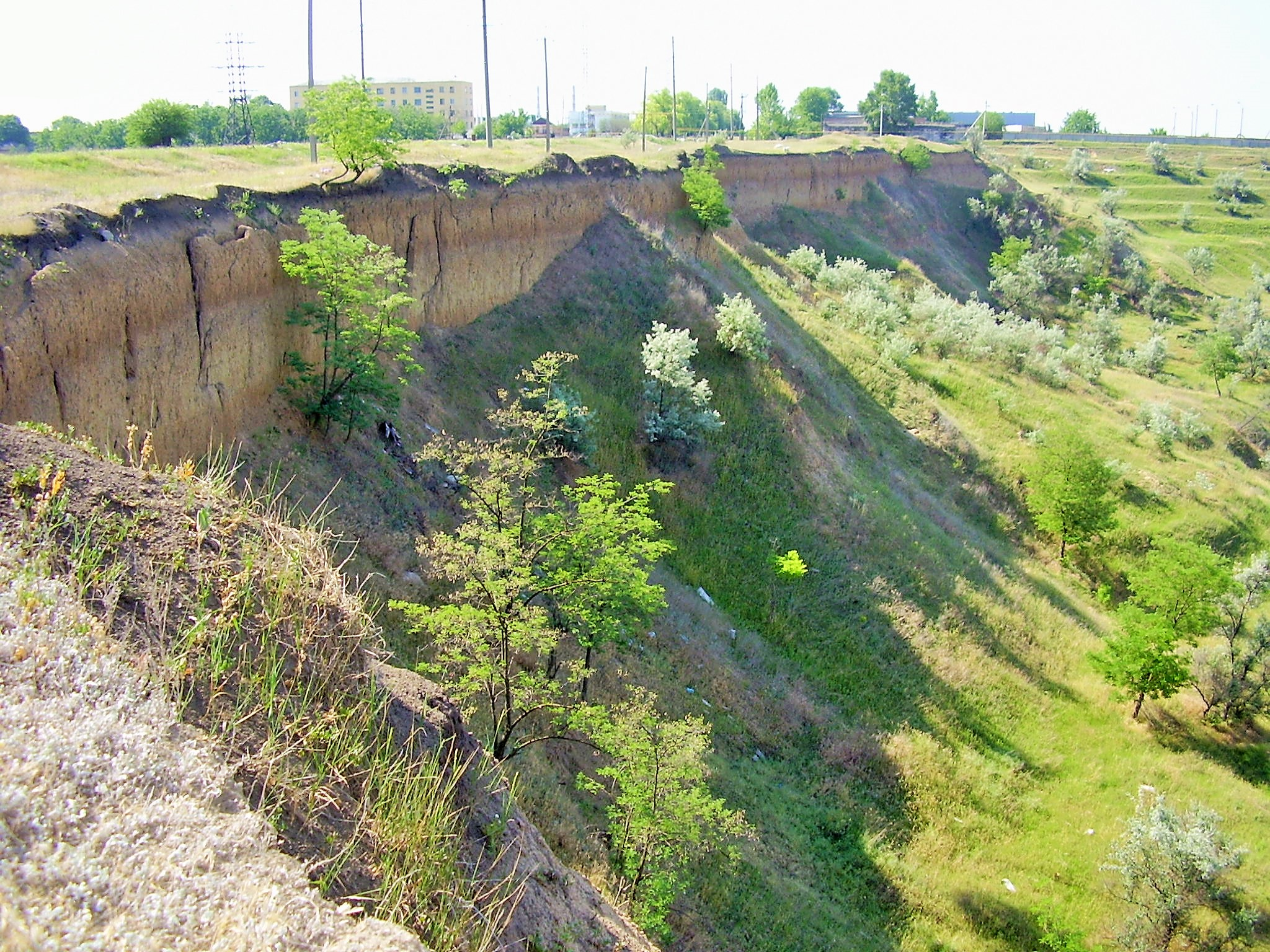 Колкотова балка, монумент природы, находится в Муниципий Тирасполь, Северная окраина мун. Тирасполь (код MD-TS-mn.A-087) A-087